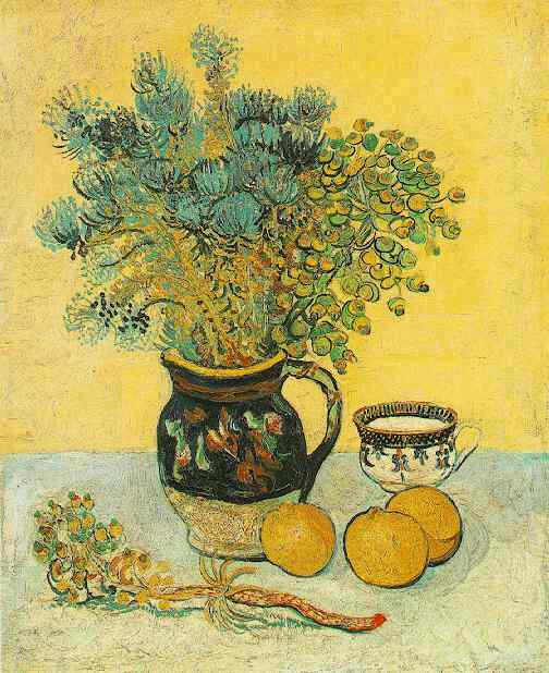 Still Life